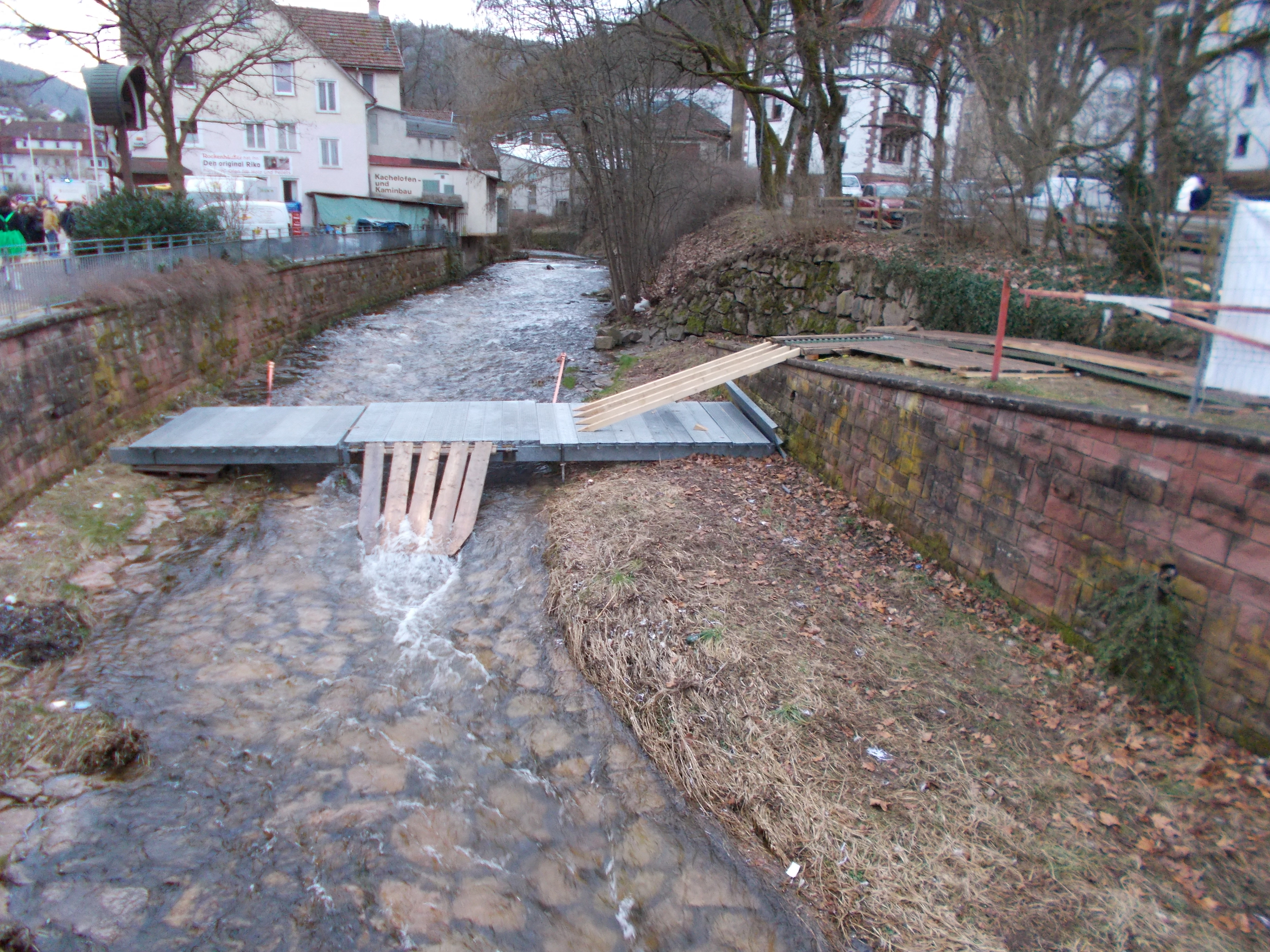 Temporäre Slipanlage für die Zuber der Bach-na-Fahrt 2019 in Schramberg